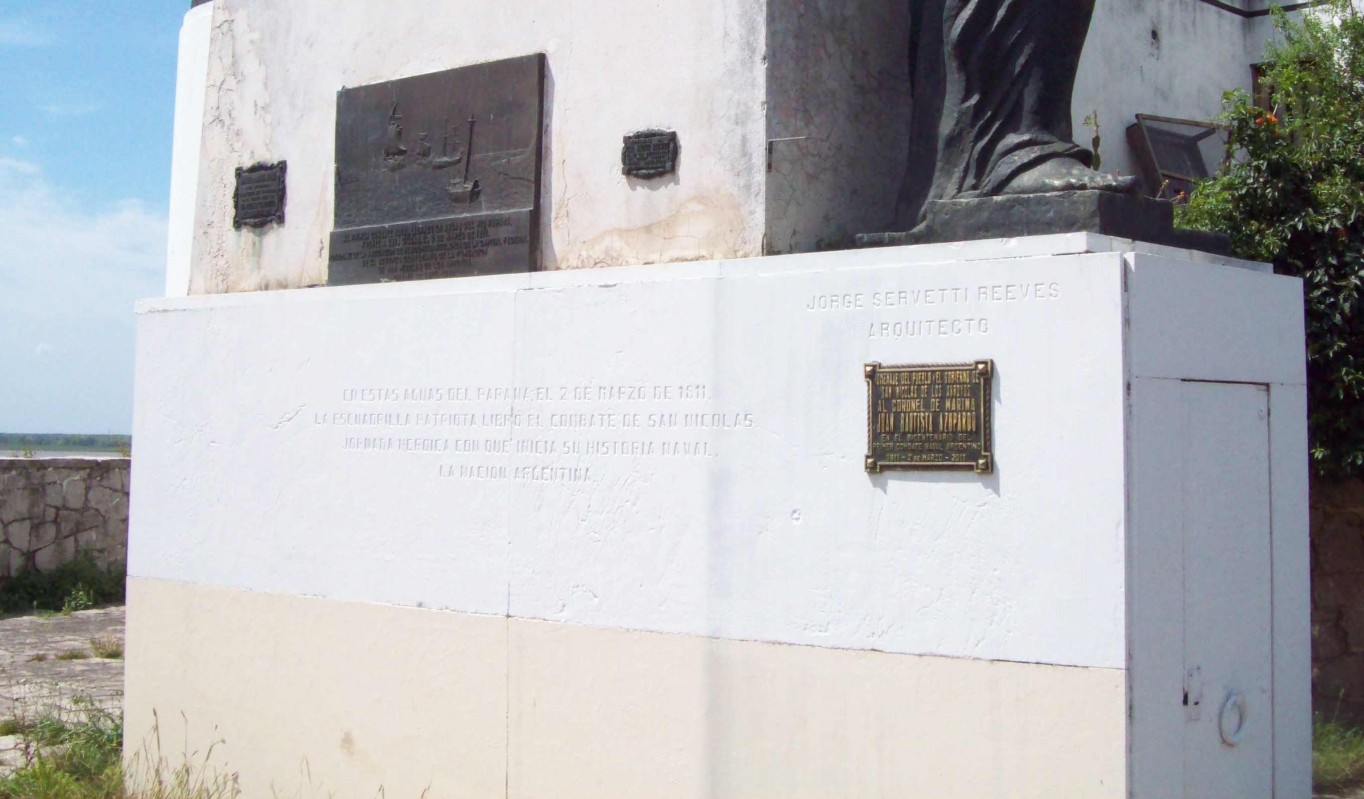 Columna con los restos de Juan Bautista Azopardo, en San Nicolás (Prov. de Buenos Aires). Creada por el arquitecto Jorge Servetti Reeves y el escultor Horacio Juárez e inaugurada el 2 de marzo de 1947.